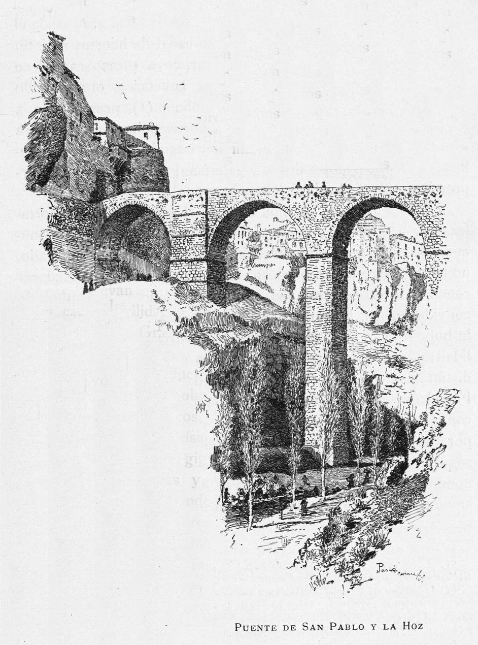 Puente de San Pablo y la Hoz, en Cuenca.